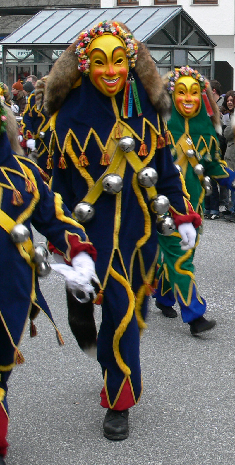 Narrensprung am Fasnetsmontag, 4. Februar 2008 in Ravensburg: Hafennarr der Narrenzunft Seegockel, Friedrichshafen